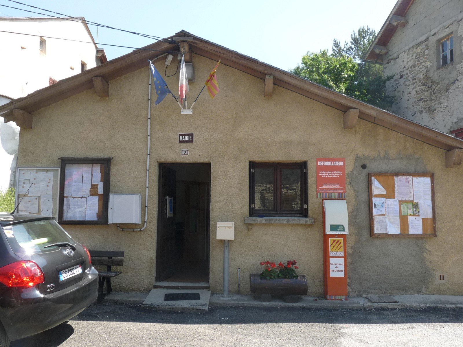 Mairie annexe de Rieutort, Pyrénées-Orientales, France